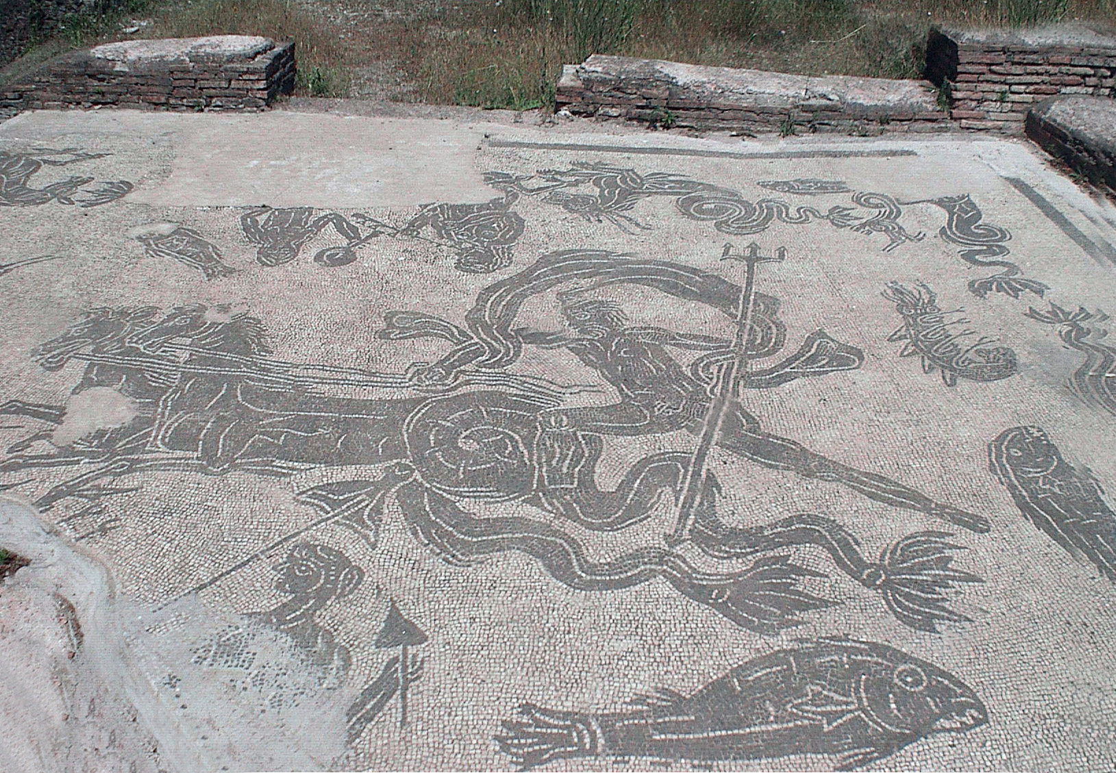 MOSAICO VILLA DI PLINIO IL GIOVANE